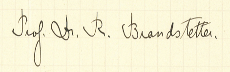 Renward Brandstetters Unterschrift (Archiv des Schweizerischen Idiotikons, Zürich)